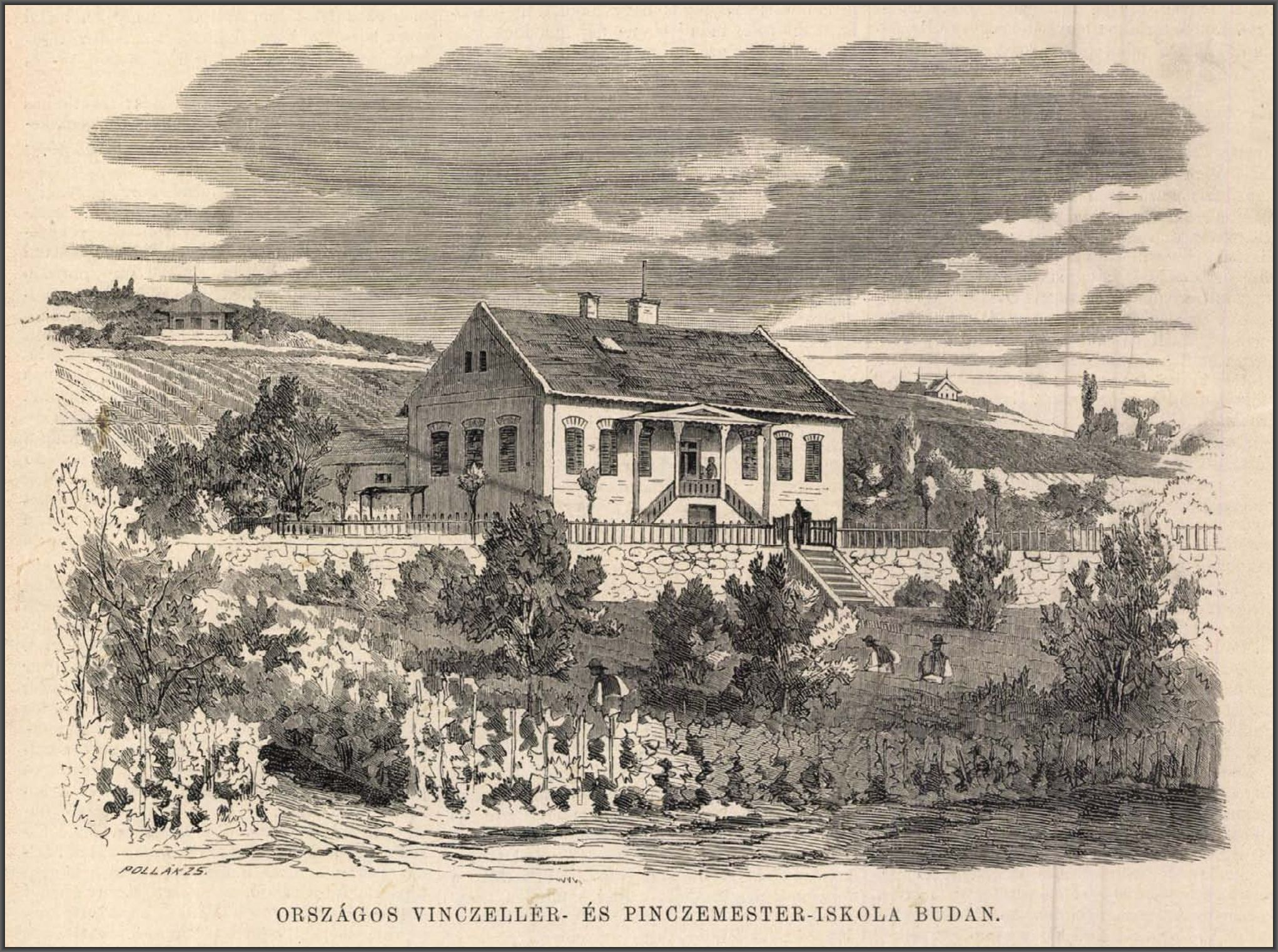 Országos vincellér- és pincemester-iskola Budán – Pollák Zsigmond metszete, 1879